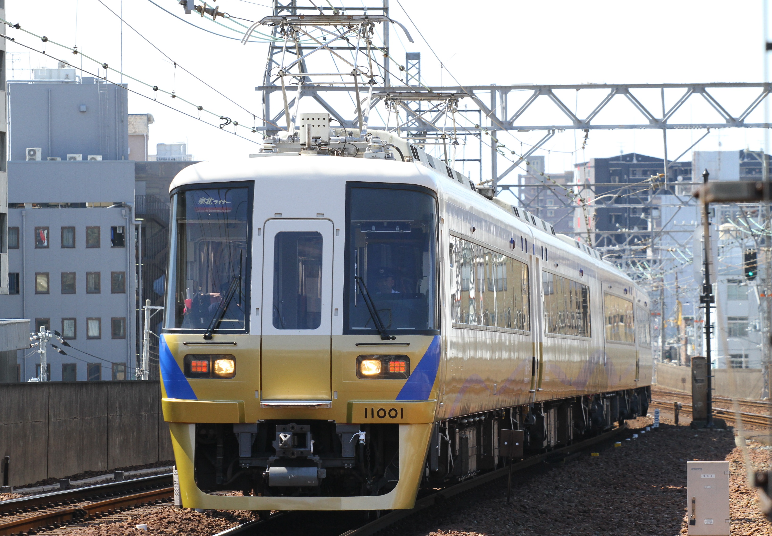 南海11000系電車 泉北ライナー専用塗装（2代目）